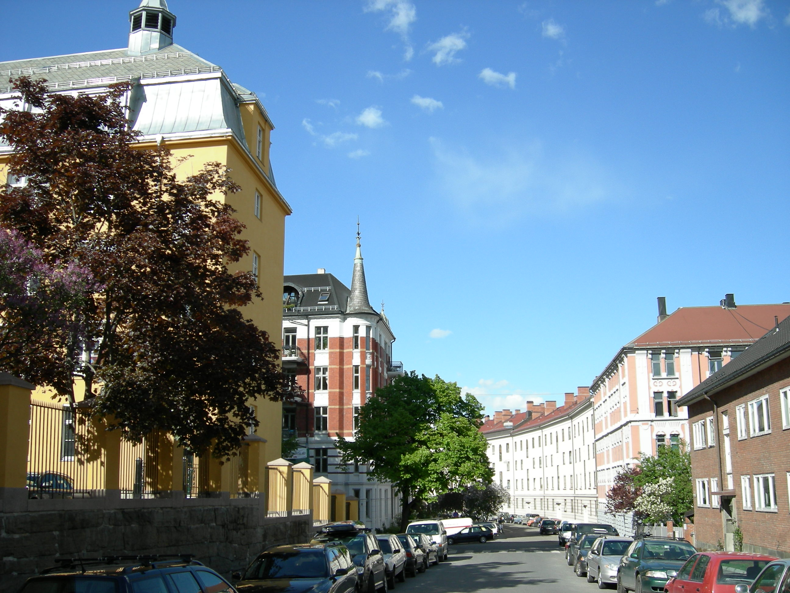 Fougstads gate på Ila i Oslo, med Ila skole og jugendgåreden nr. 22 og 25. Bildet tatt av brueren og er hans eiendom.